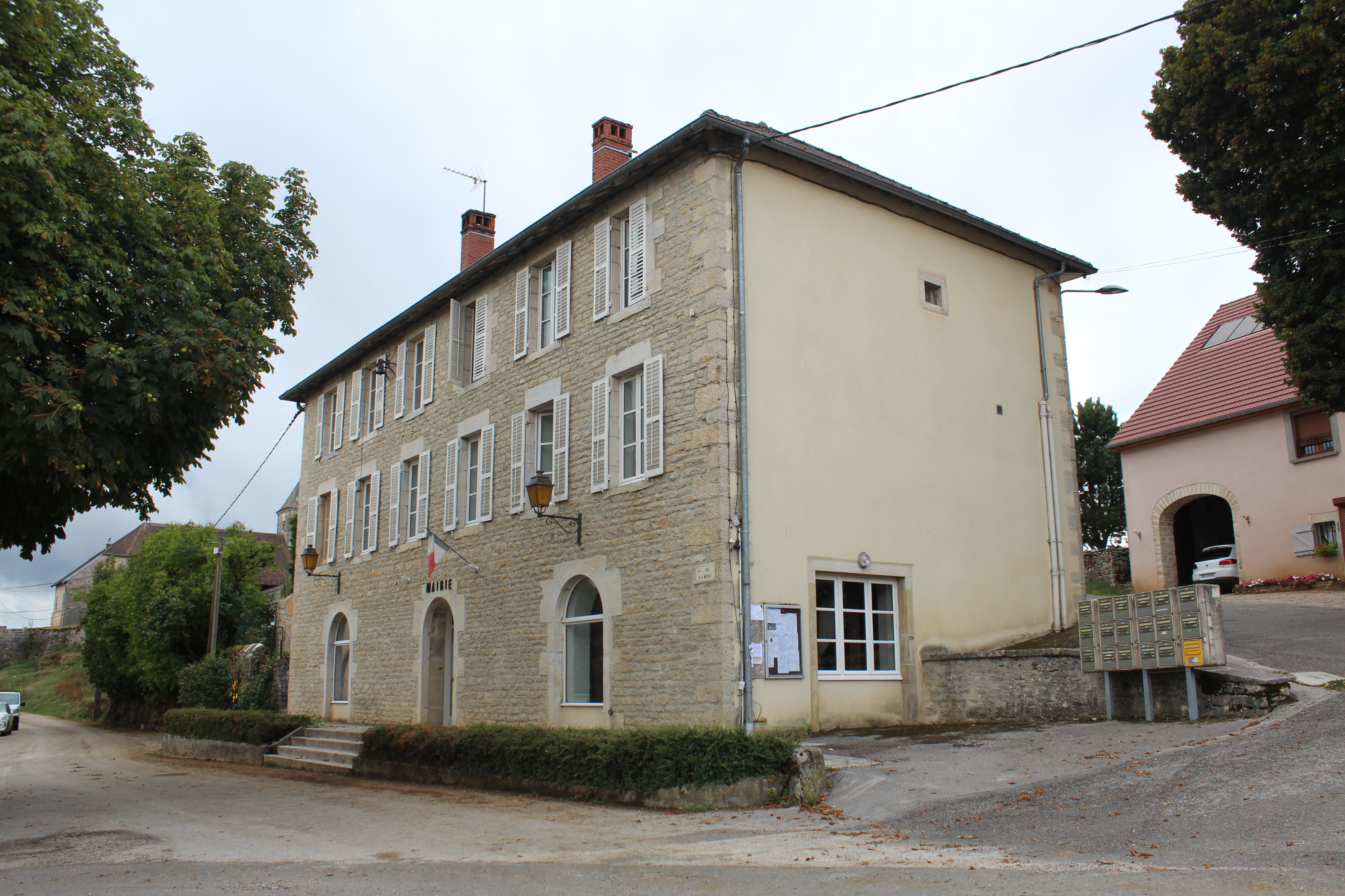 Mairie du Fied.